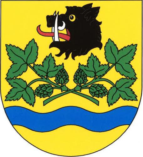 Radovesice znak